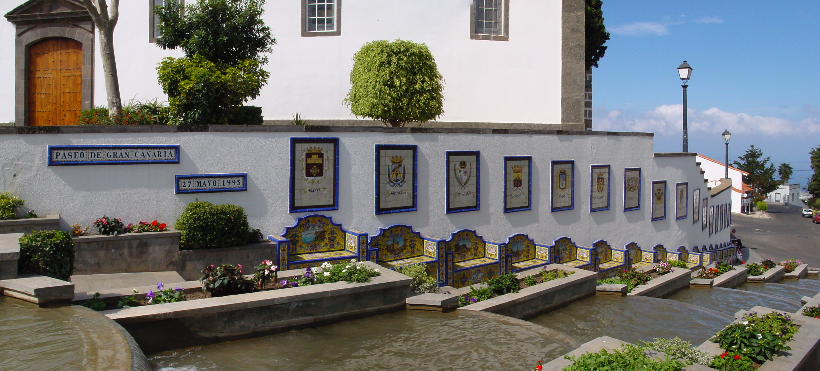 Firgas Paseo de Gran Canaria, Gran Canaria, Spain.